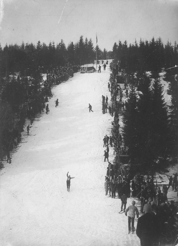 Holmenkollbakken